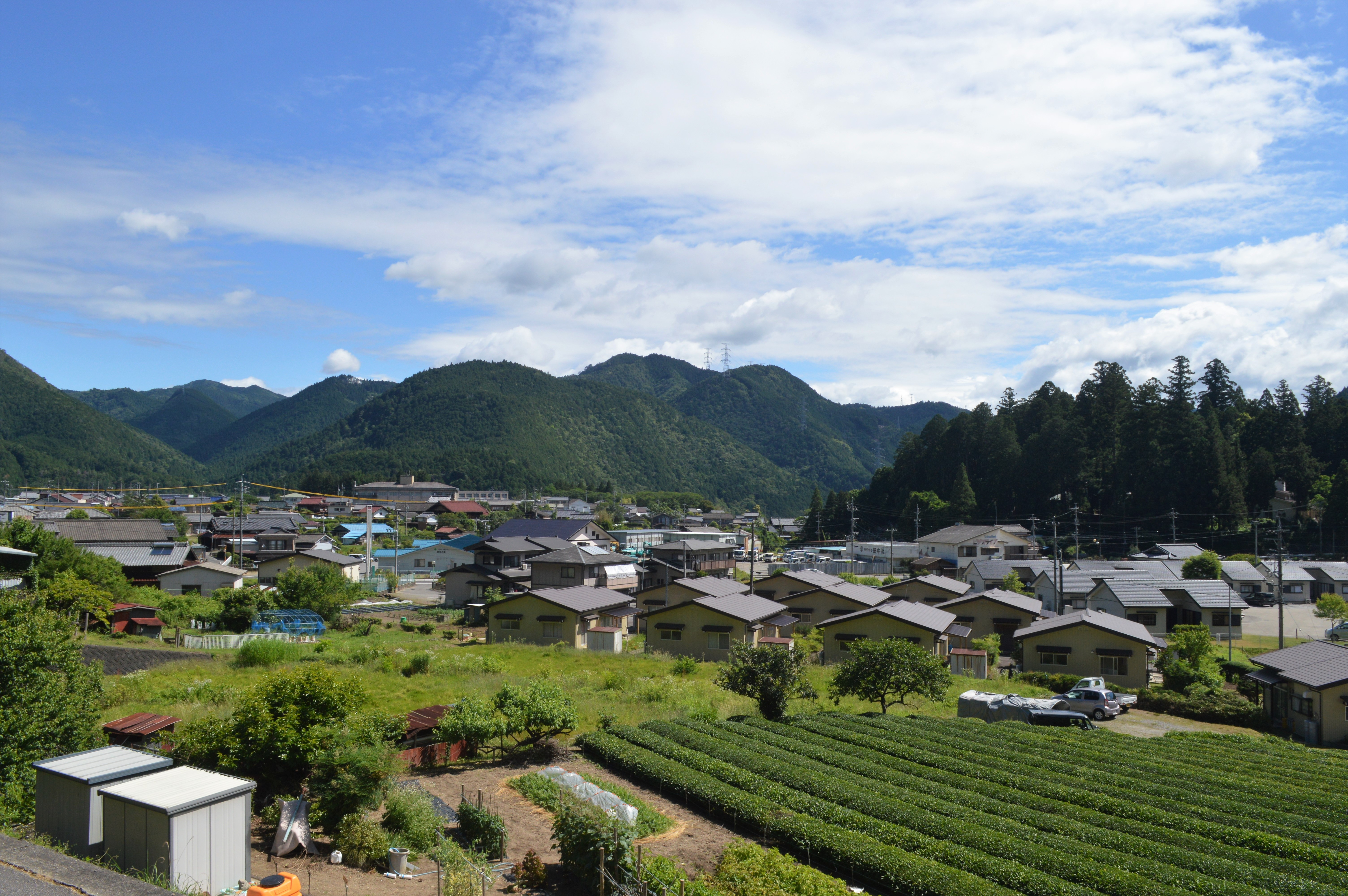 愛知県北設楽郡東栄町本郷。右の社叢は諏訪南宮神社。